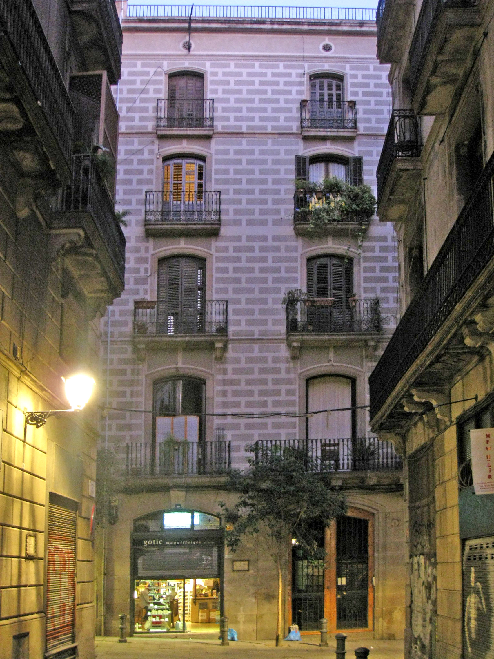 Casa Felicià Tarrés, d'Antoni Rovira i Rabassa (1860), al núm. 6 del carrer de la Comtessa de Sobradiel, al barri Gòtic de Barcelona